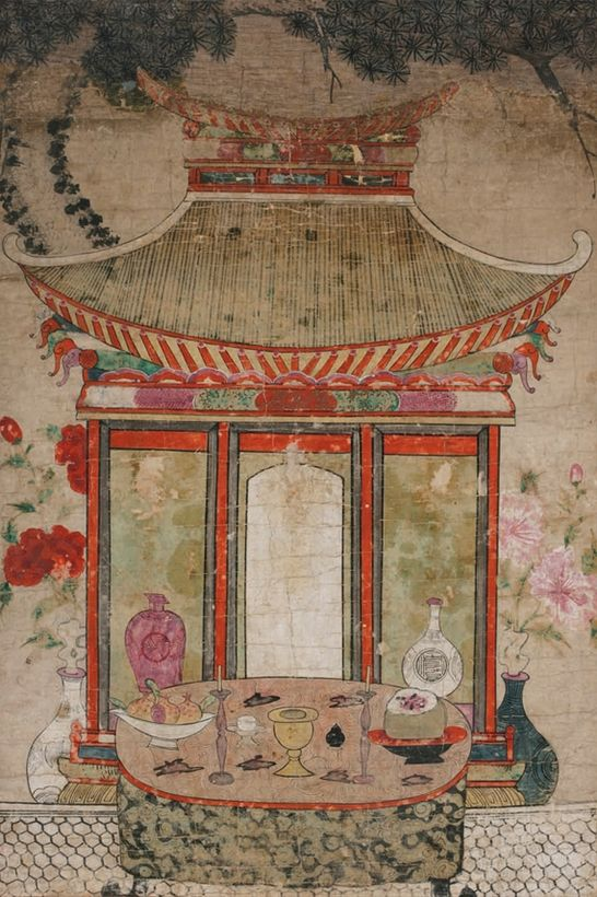 조선 시대의 민화 중 하나인 감모여제도 (感慕如在圖), 혹은 사당도 (祠堂圖), 72 cm x 108.3 cm